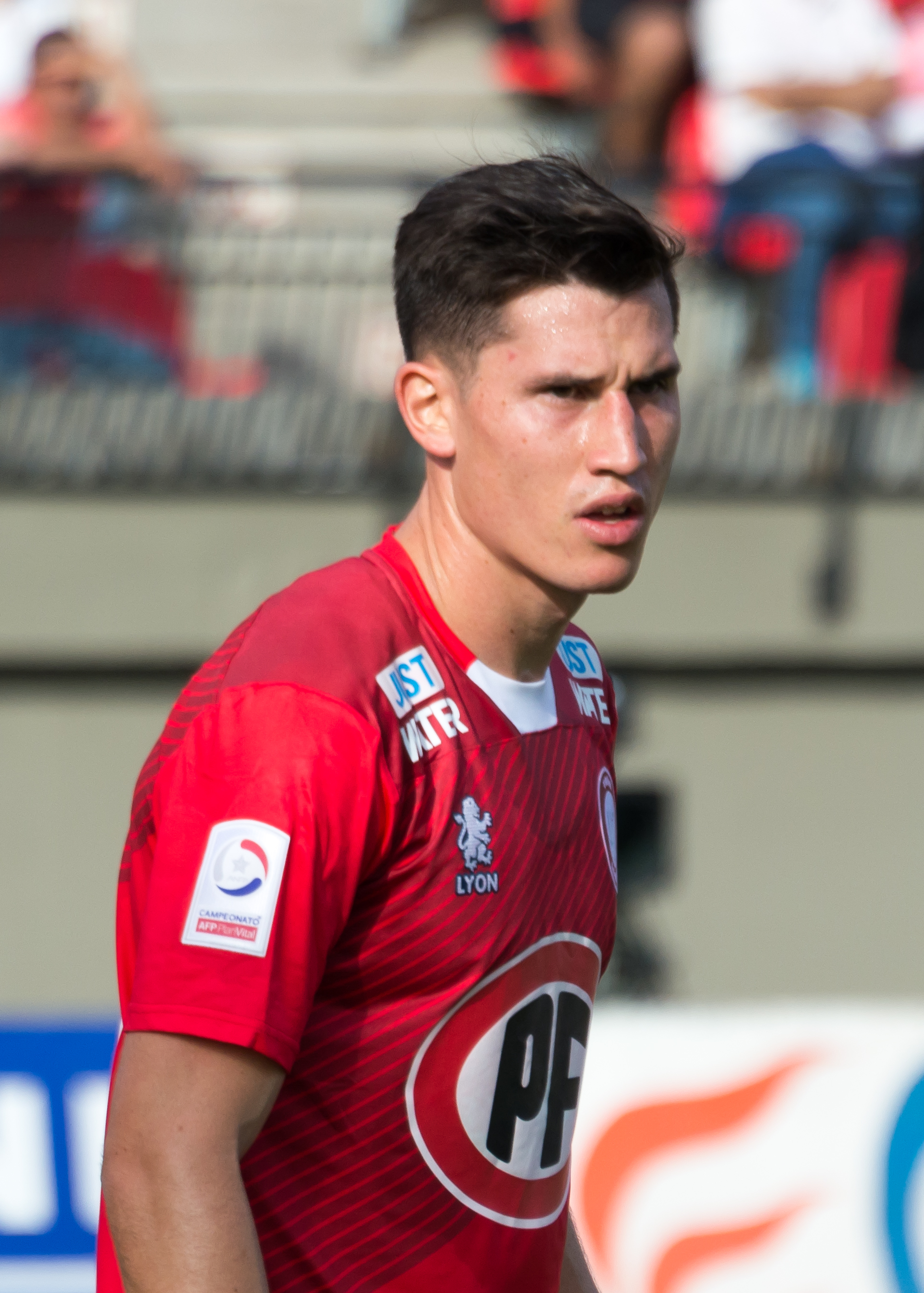 Eugenio Isnaldo, Unión La Calera v Colo-Colo, Estadio Municipal Nicolás Chahúan Nazar, La Calera, Región de Valparaíso, Chile.